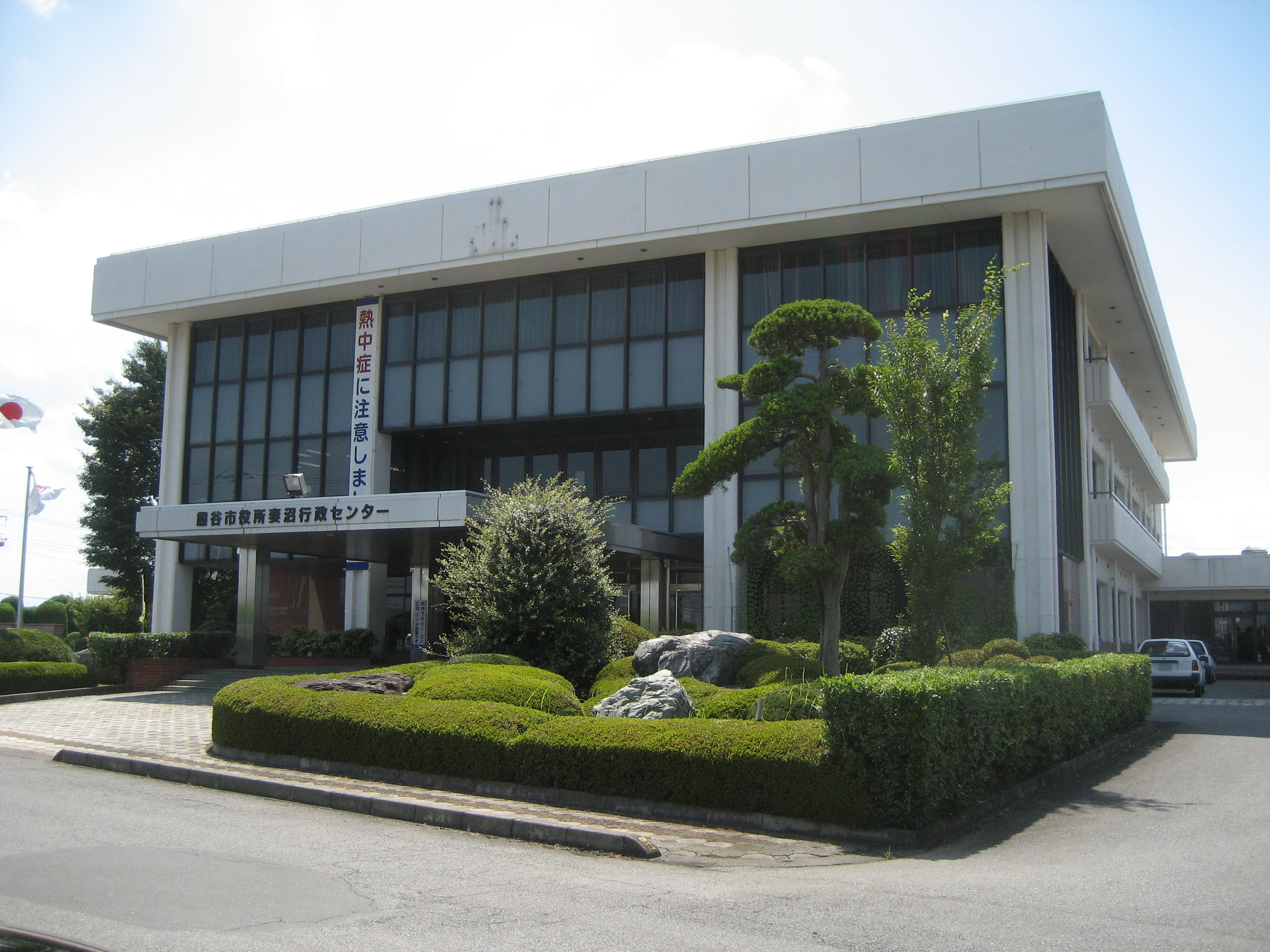 熊谷市役所妻沼行政センター庁舎（旧妻沼町役場）１